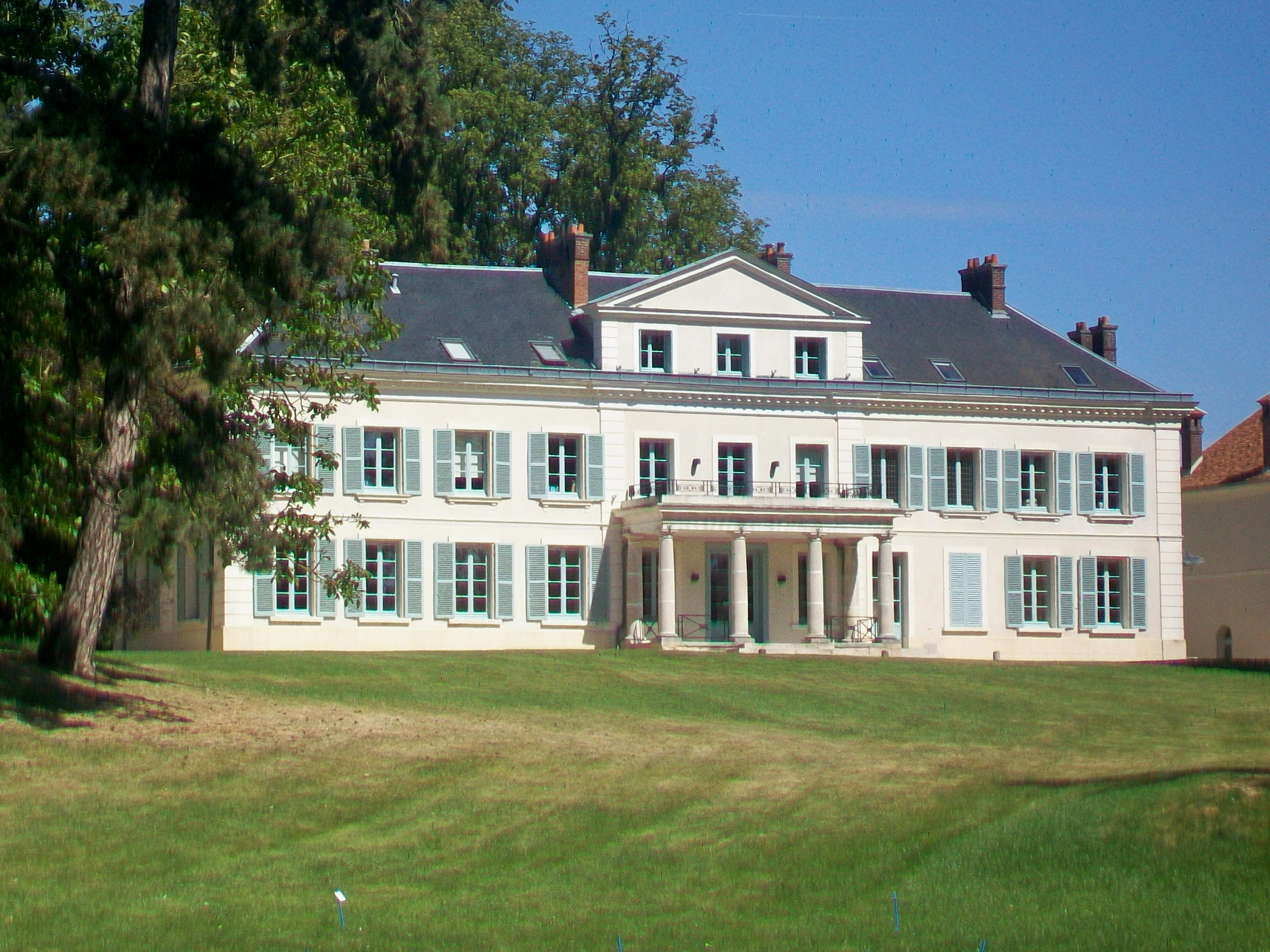 Le château des Carneaux, manoir construit en 1846 ; associé à une grande ferme du même nom.